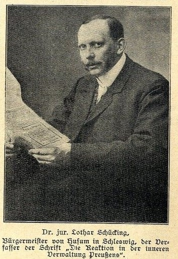 Dr. jur. Lothar Schückingh 1908